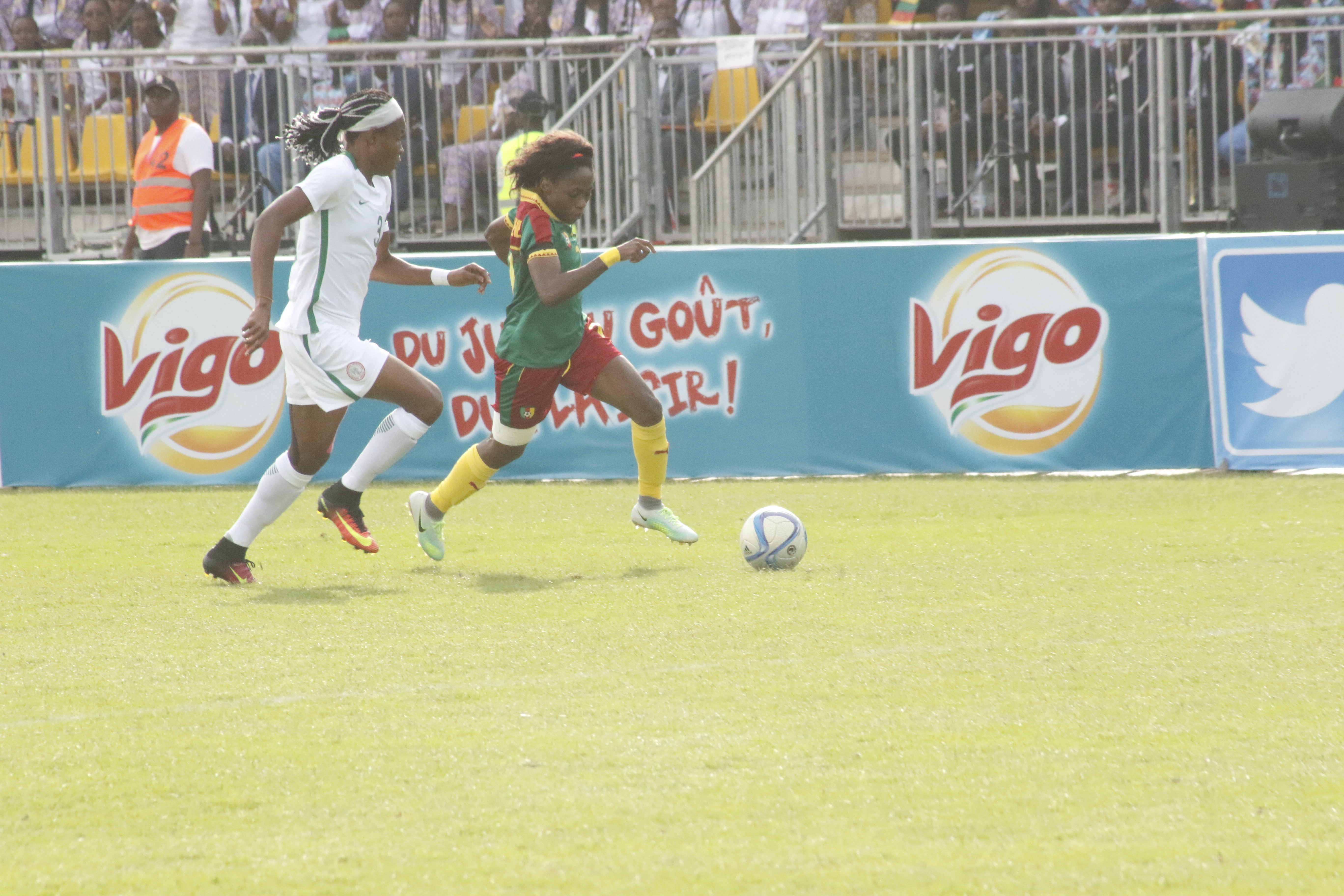 Aboudi Onguené en pleine action pendant la finale de la Coupe d'Afrique des Nations